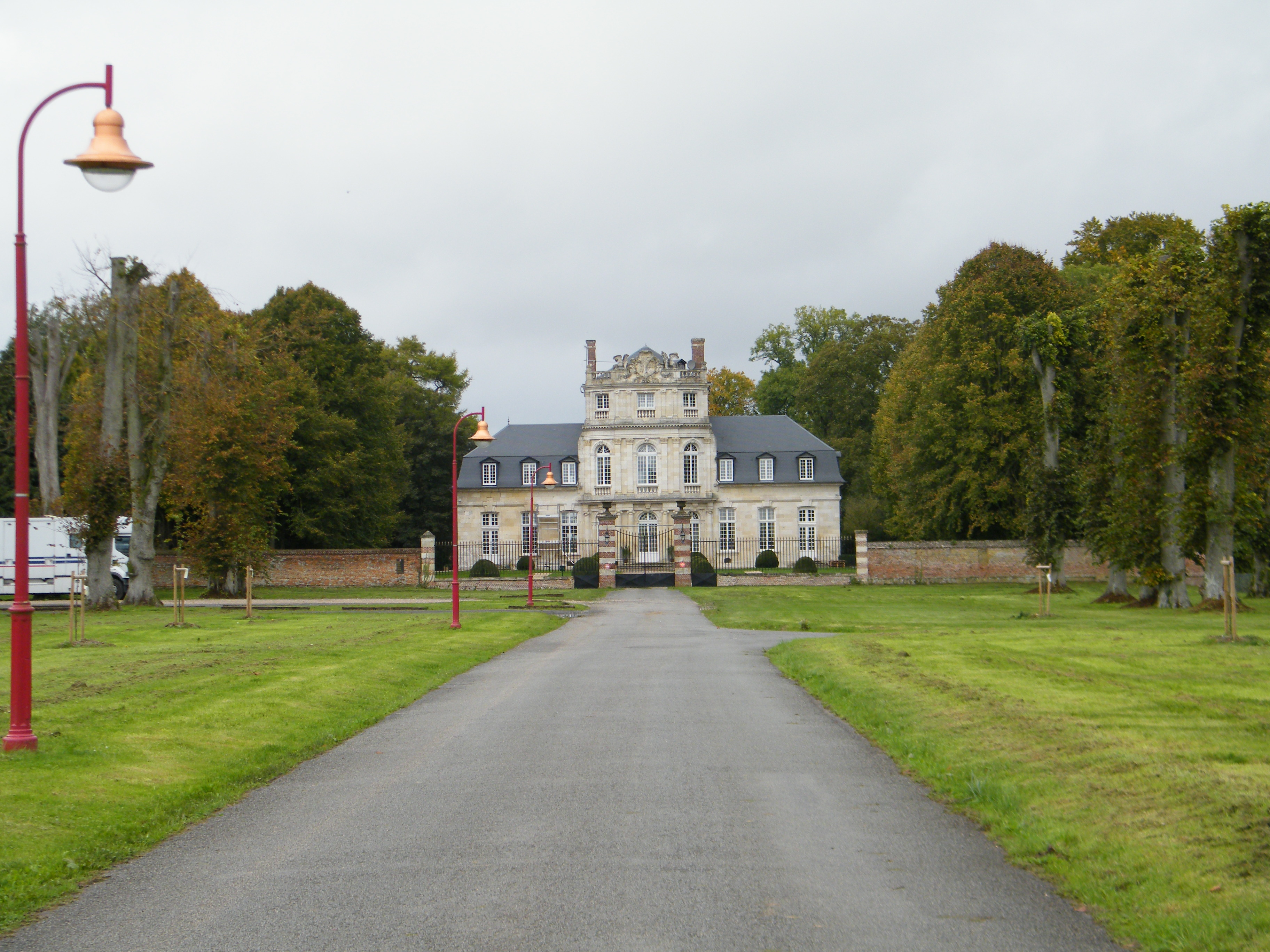 Château.